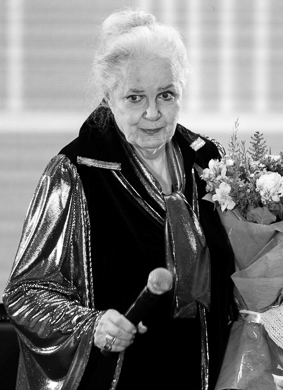 Народная артистка СССР Элина Быстрицкая